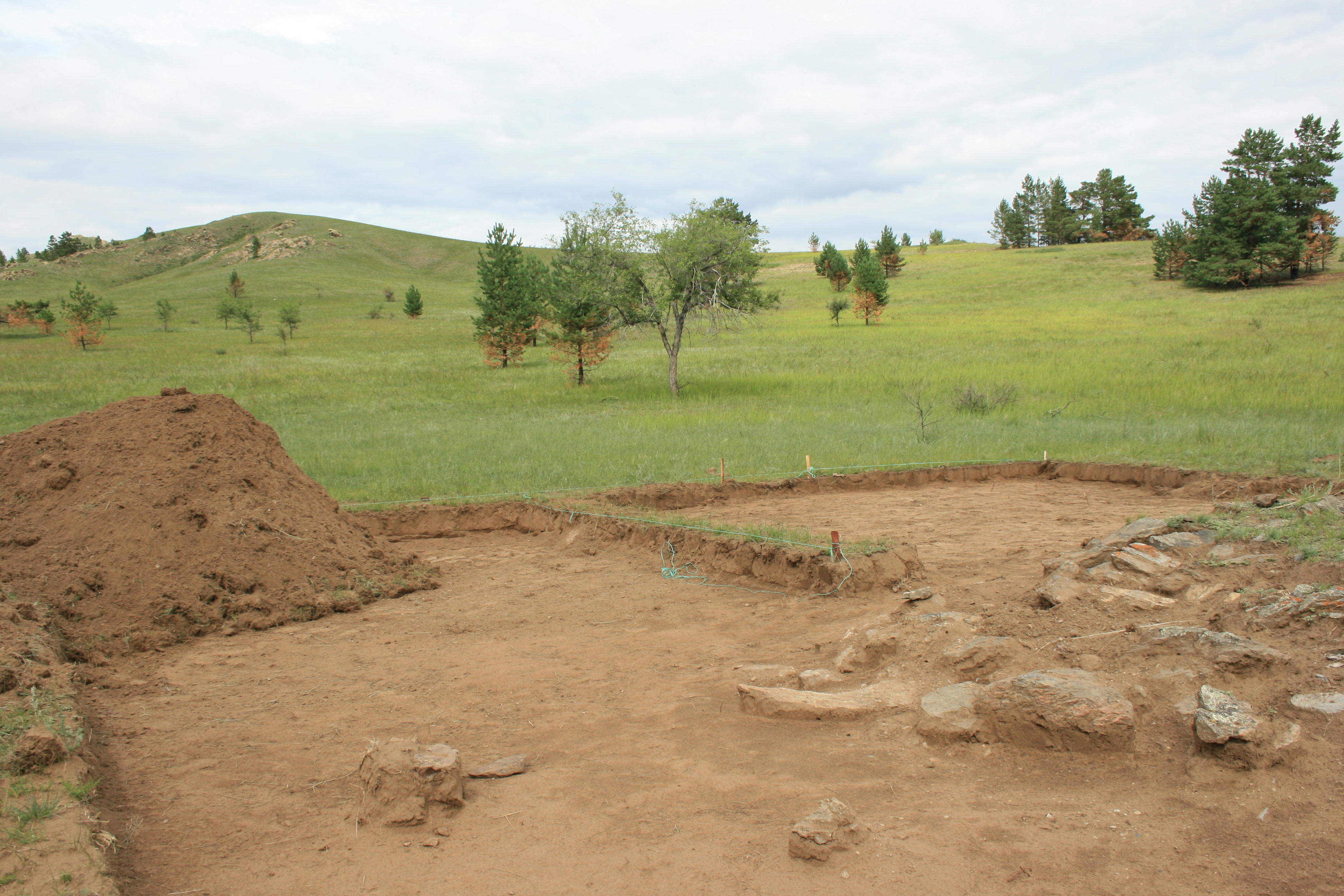 Раскопки гуннского царского могильника в местности Оргойтон I